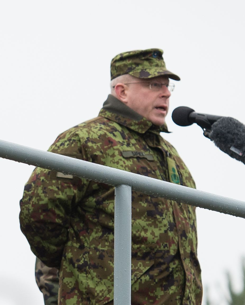 BG Indrek Sirel